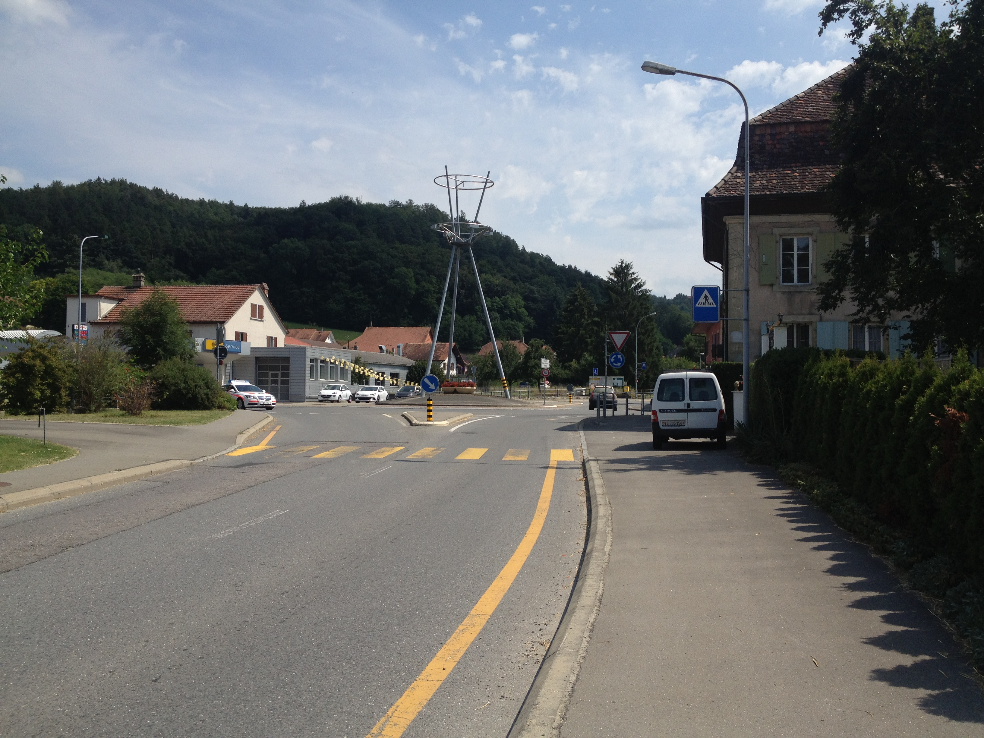 Le village de Marnand dans la commune vaudoise de Valbroye en Suisse.